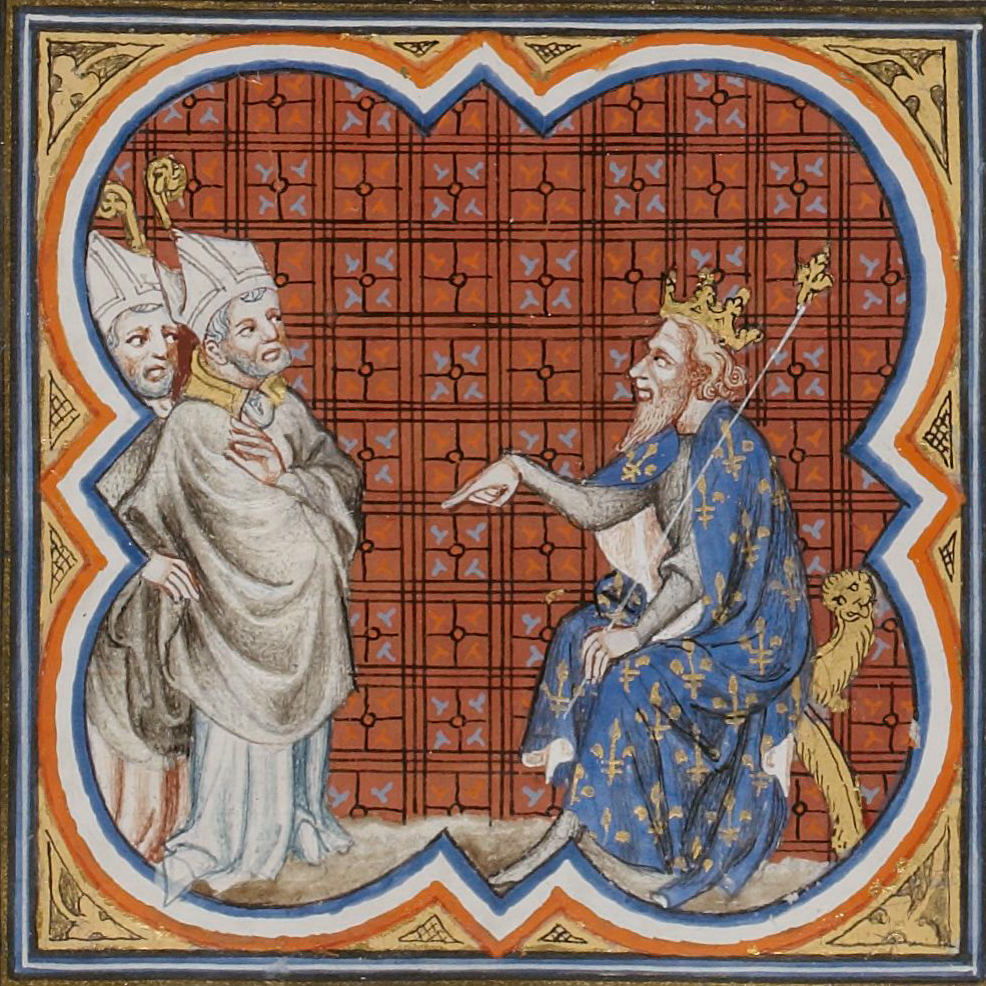 Saint Grégoire, archevêque de Tours, et saint Salve, évêque d'Albi, devant Chilpéric Ier. (FR 2813) fol. 41v. Grandes Chroniques de France de Charles V. France, Paris, XIVème siècle. (65 x 65 mm).